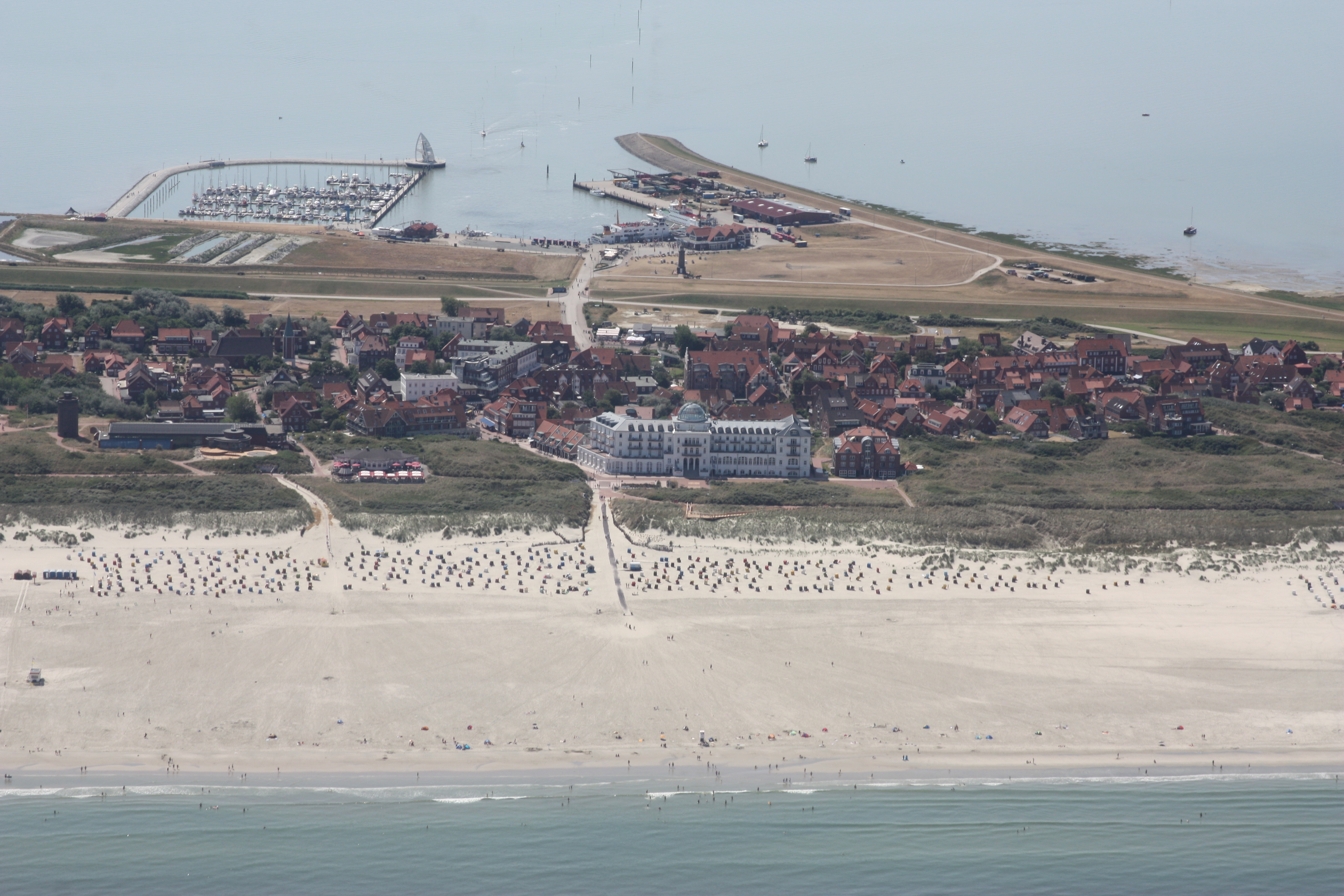 Flug über Juist - von Borkum kommend, zuerst am Nordstran entlang; Flughöhe 500 m = 1500 ft; Juli 2010